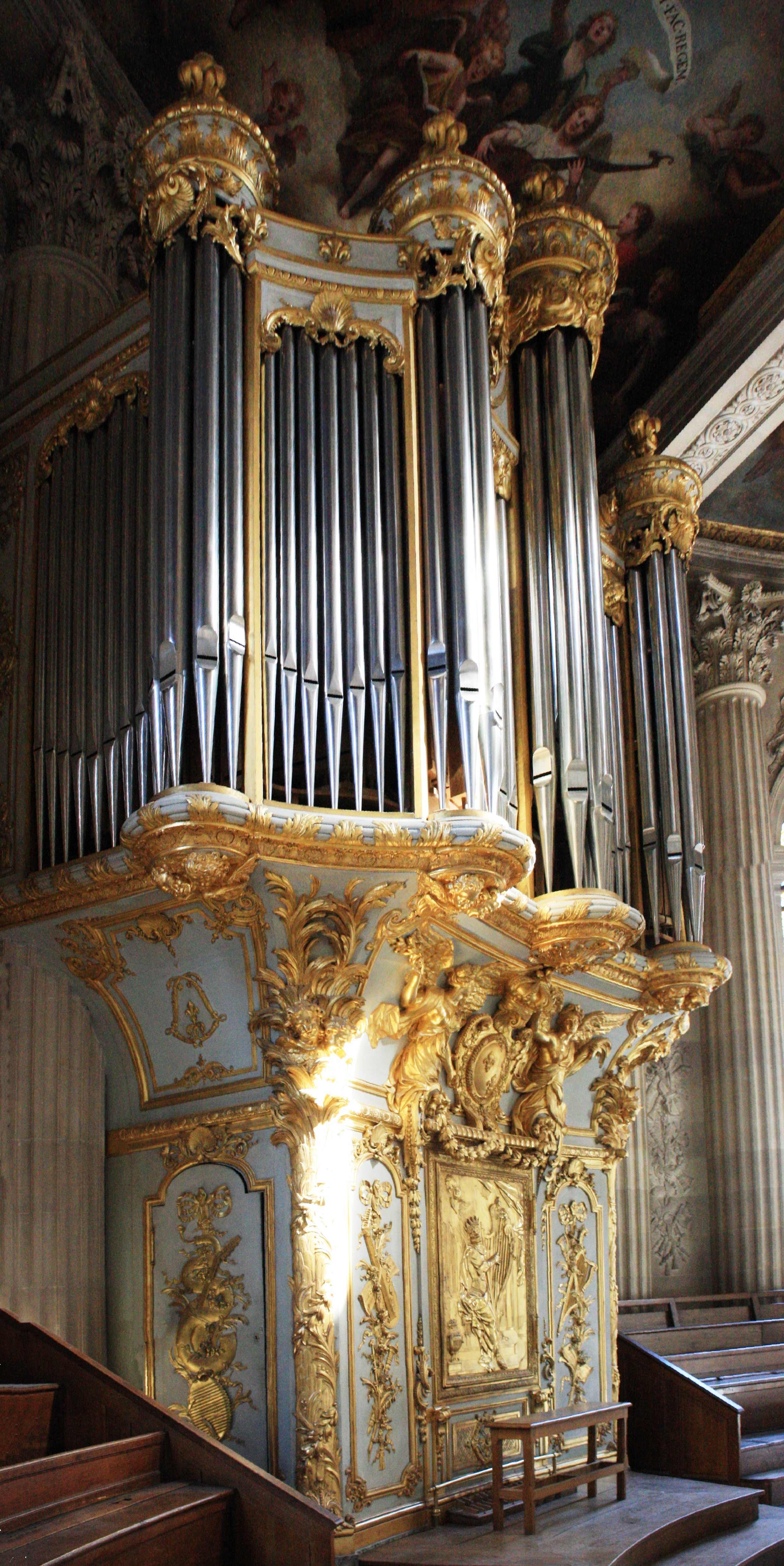 Orgue de la Chapelle Royale de Versailles.